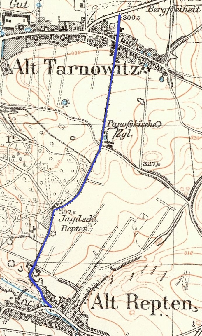 Ulica Repecka łącząca Stare Tarnowice i Stare Repty na niemieckiej mapie z 1929 (na podstawie mapy z 1883)